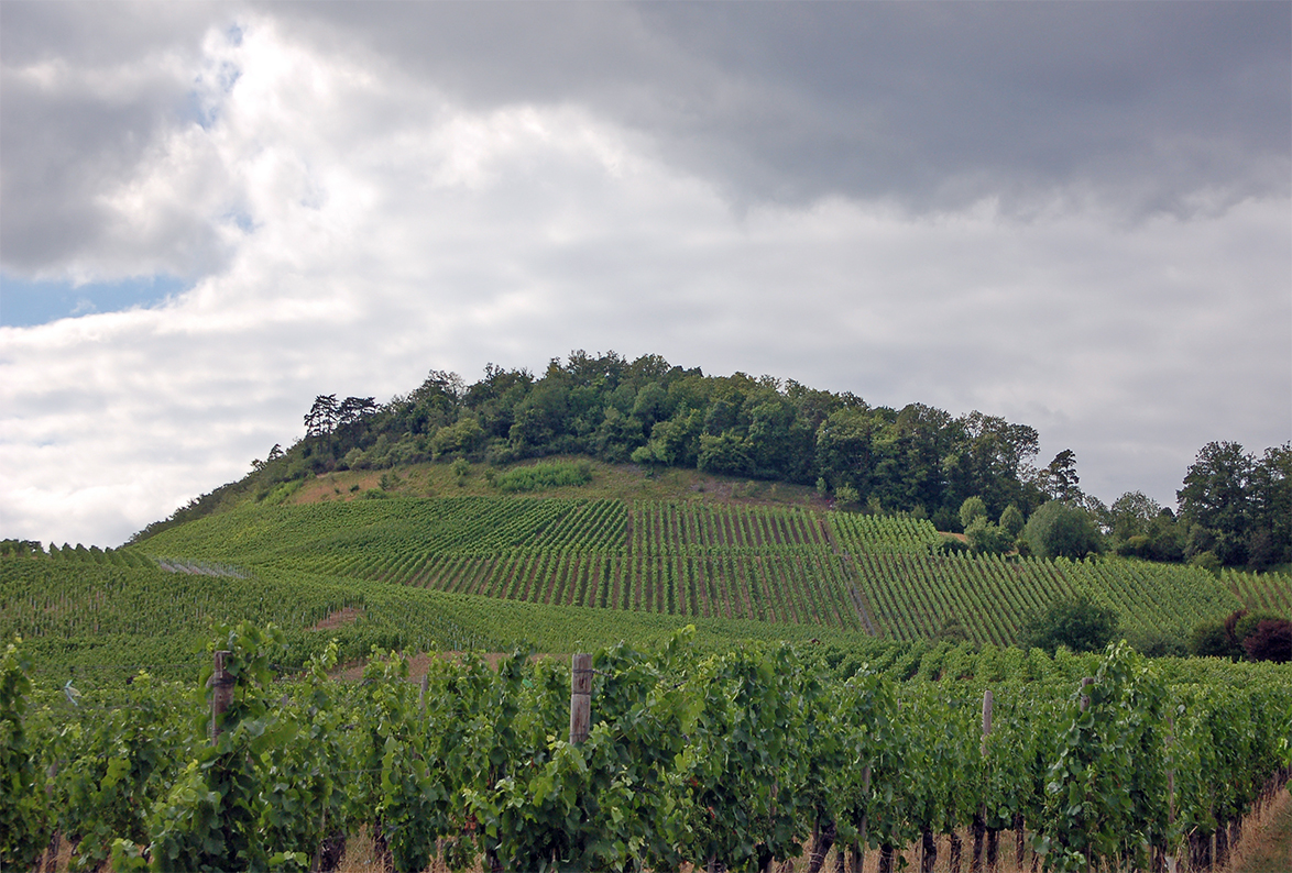 Eselsberg über Ensingen von Südosten